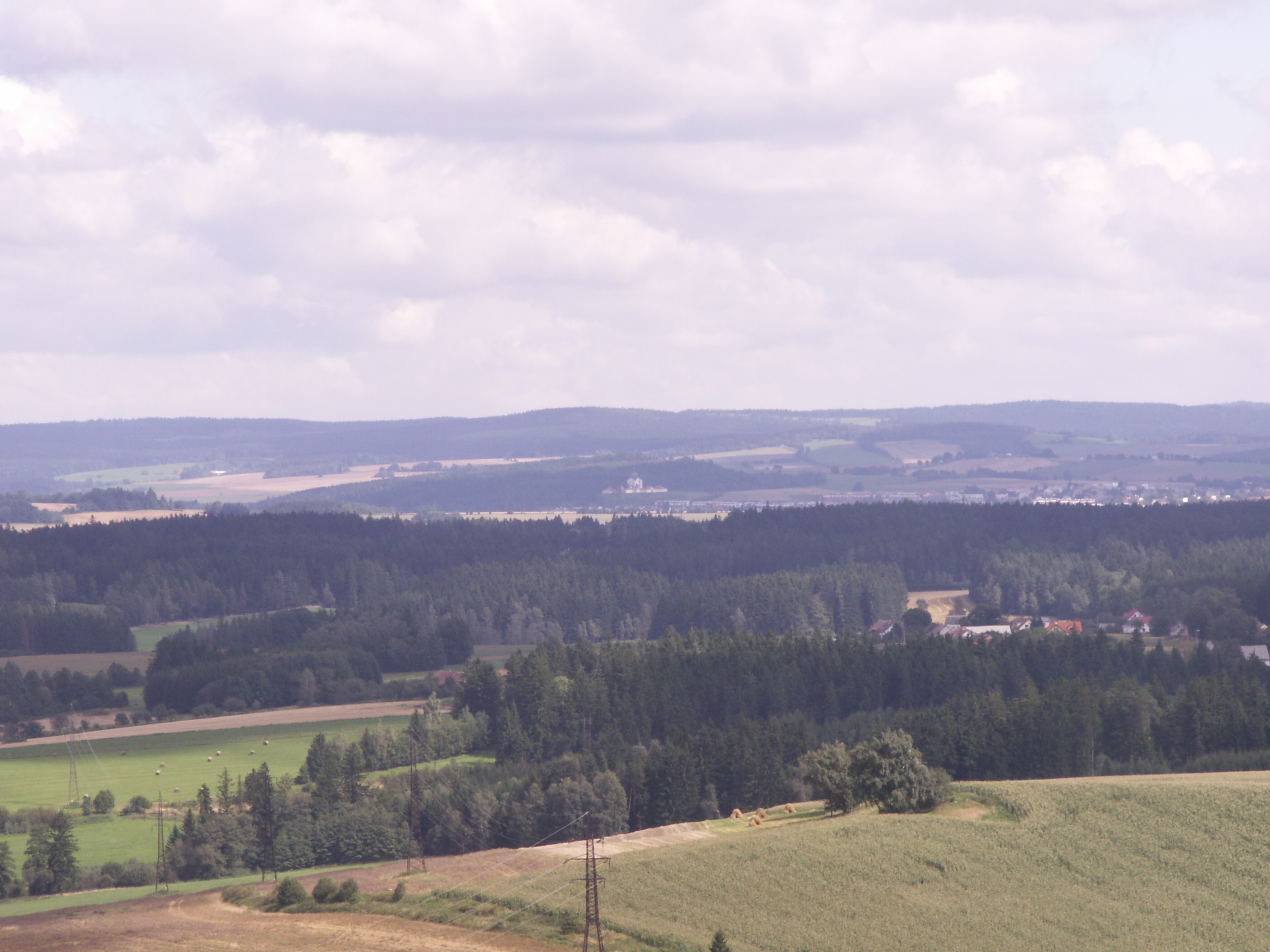 Pohled na Poutní kostel sv. Jana Nepomuckého na Zelené hoře u Žďáru nad Sázavou z rozhledny Rosička